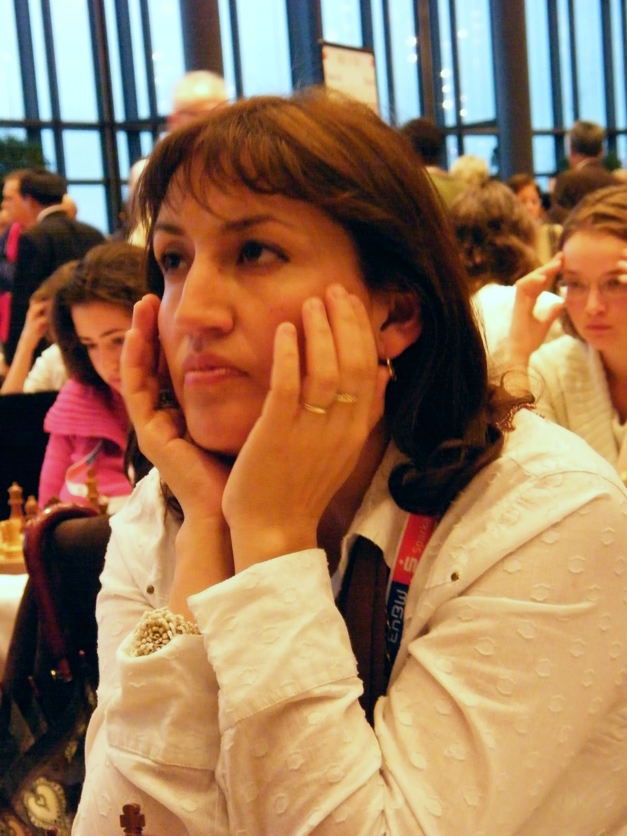 Claudia Amura bei der 38. Schacholympiade in Dresden 2008